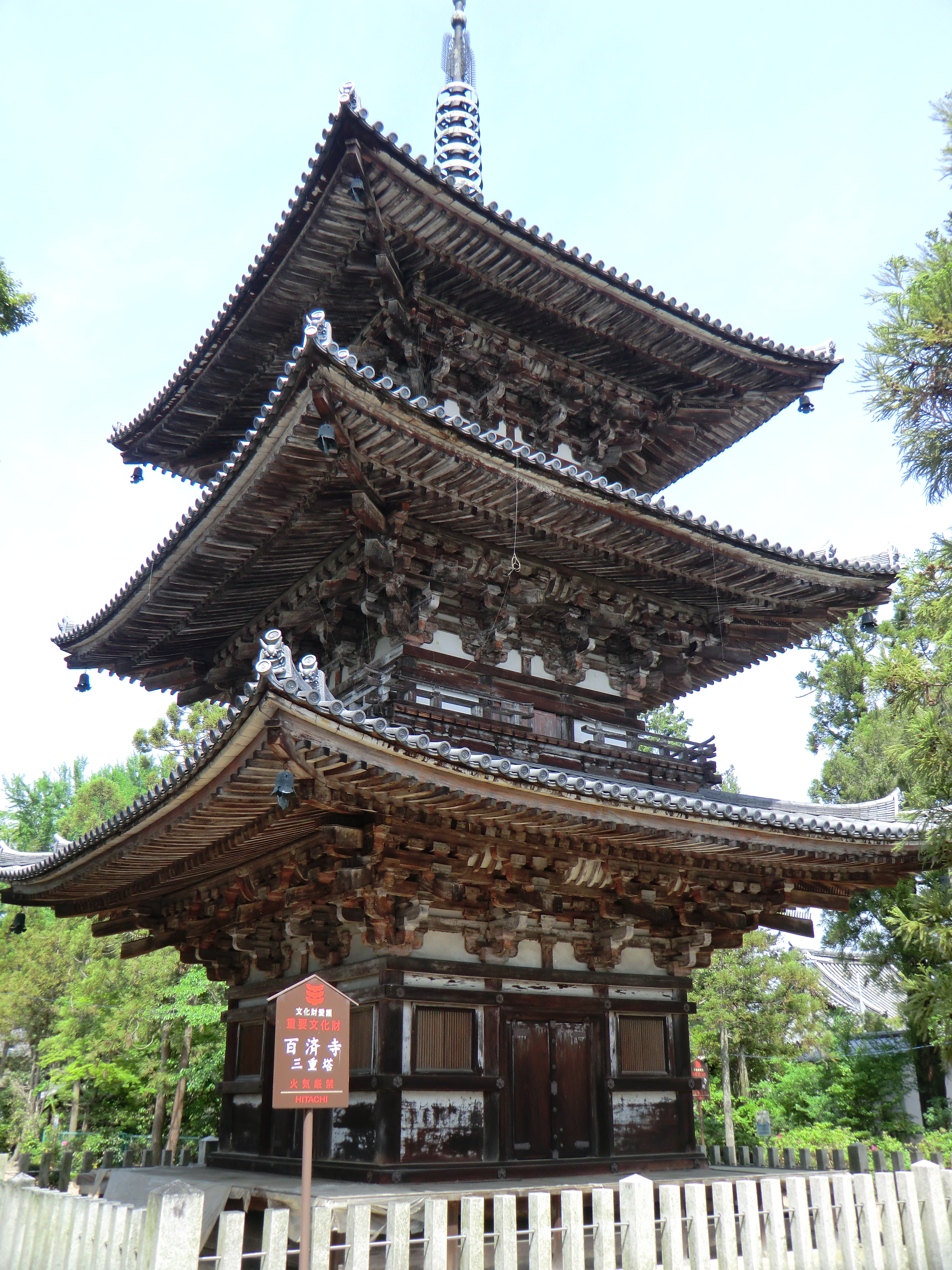 百済寺 (百濟寺) 三重塔 (奈良県北葛城郡広陵町大字百済)